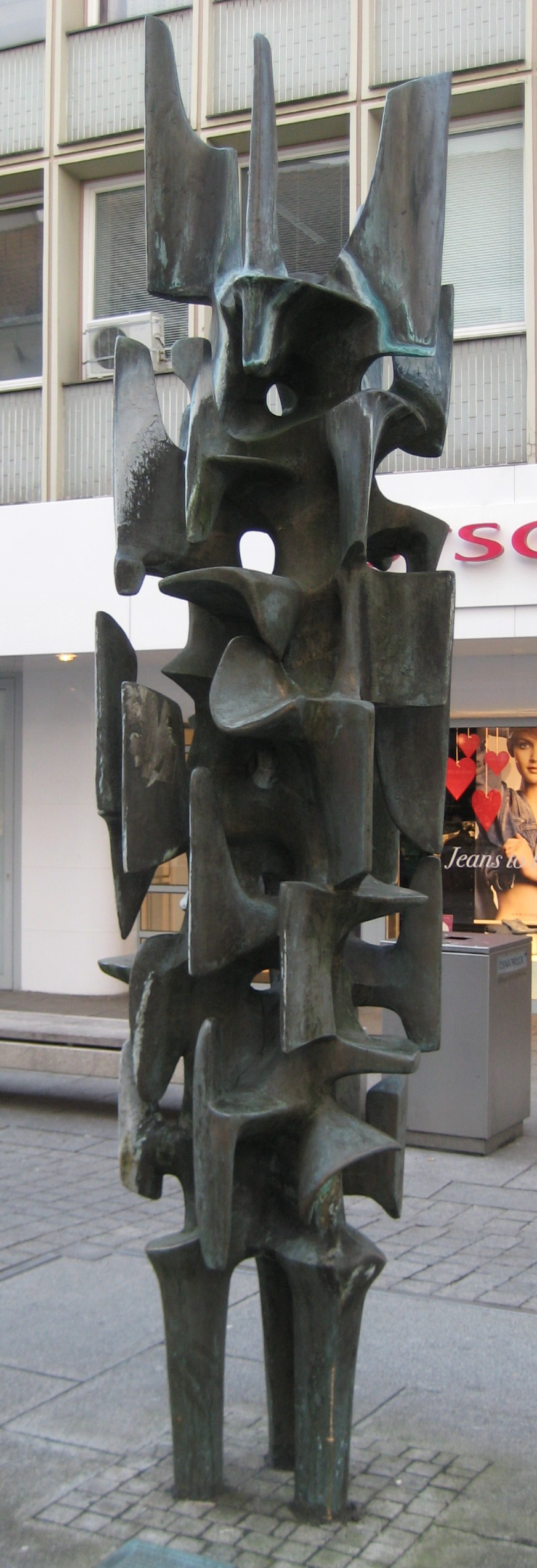 Walter Mellmann (1910-2001): so genannter "Tränenbrunnen" in Osnabrück, Bronze, Granitplatte, 1973